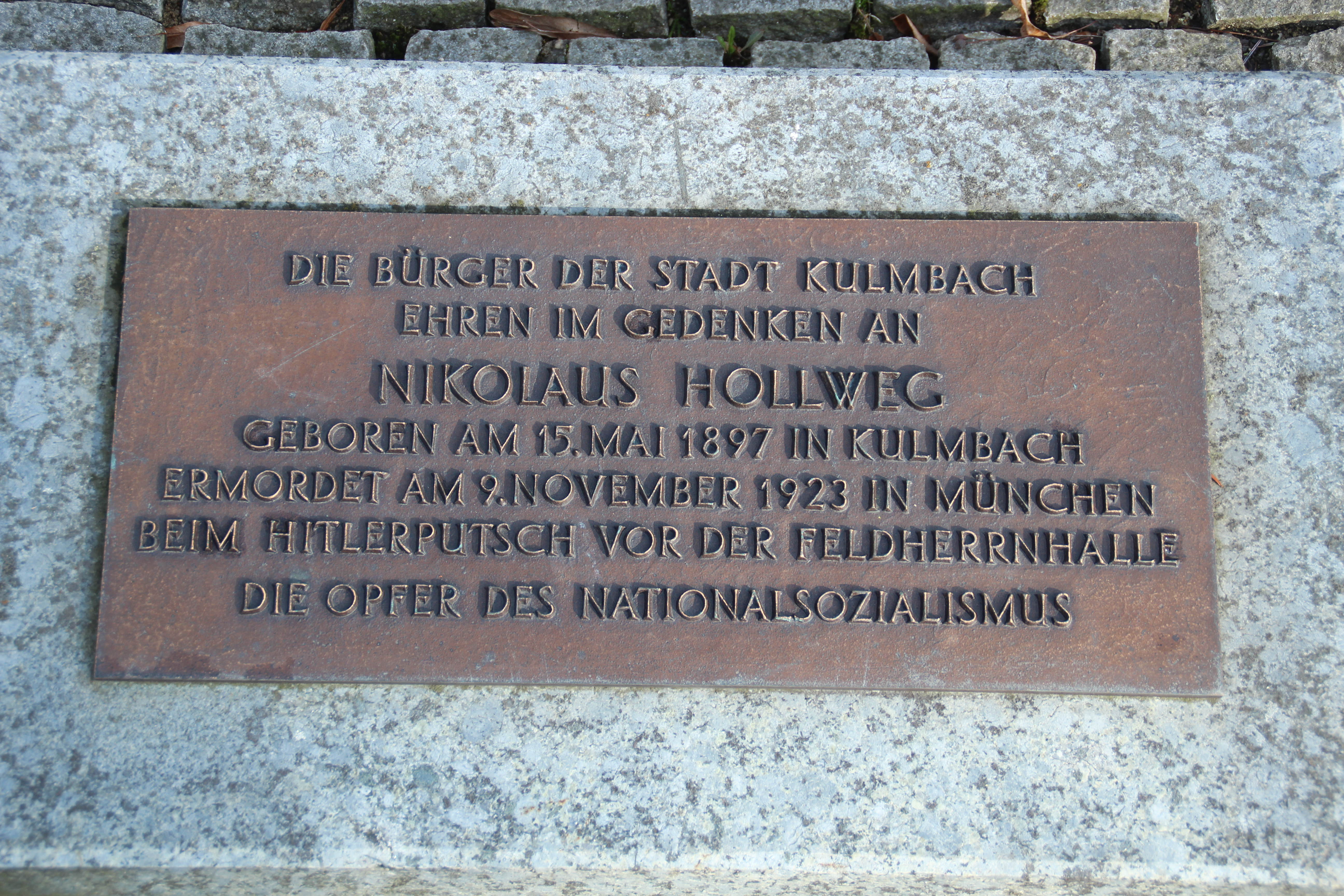 Gedenktafel der Stadt Kulmbach am Kriegerdenkmal in Kulmbach